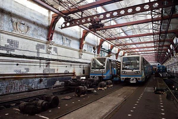 Поезда 81-740/741 «Русич» в депо «Измайлово» на территории цеха подъёмного ремонта (бывшей станции «Первомайская»)